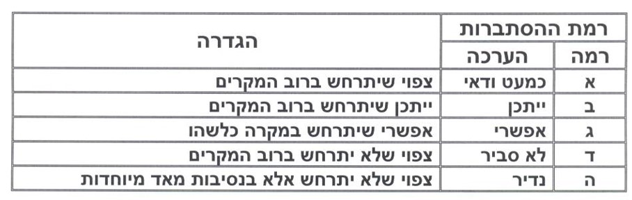 חמשת האינטרוואלים המקובלים להערכת הסתברות להתרחשות סיכון